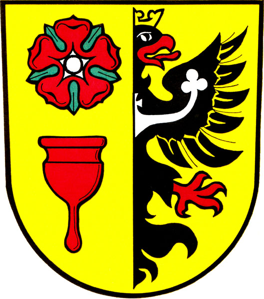 Znak obce Supíkovice